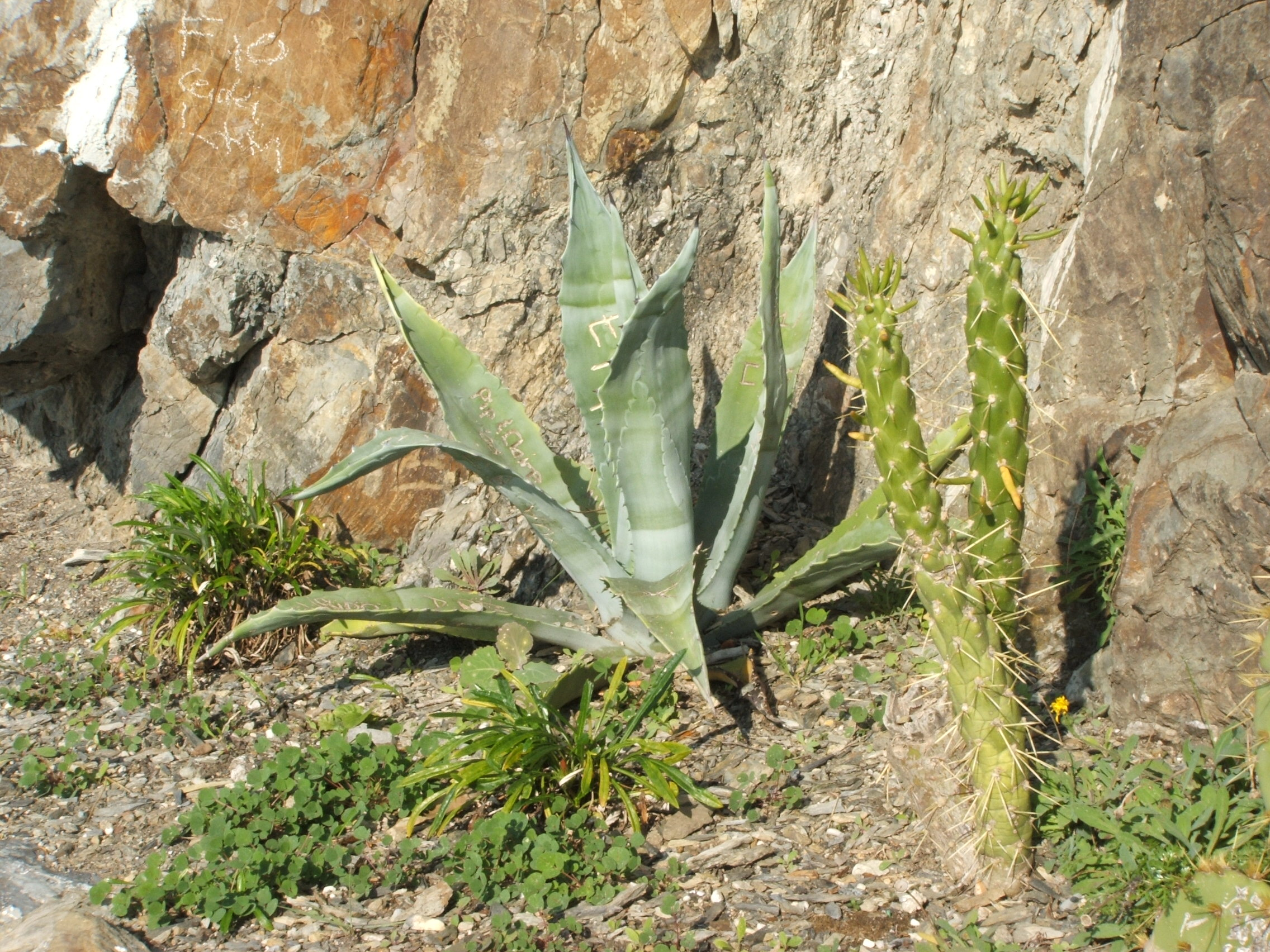 Immagine dalle Cinque Terre: Via dell'Amore Manarola - vegetazione